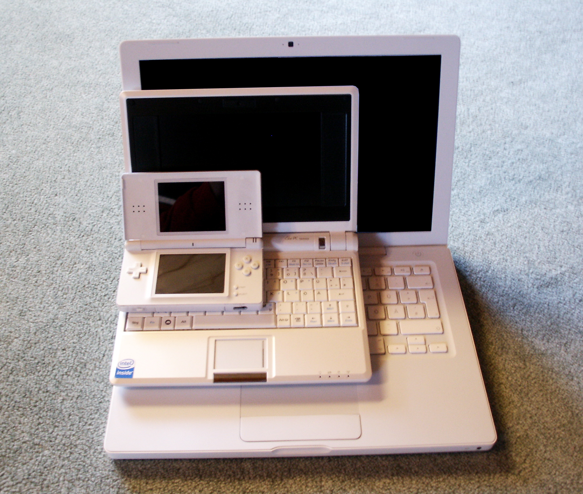 Apple MacBook, EeePC, Nintendo DS Lite.